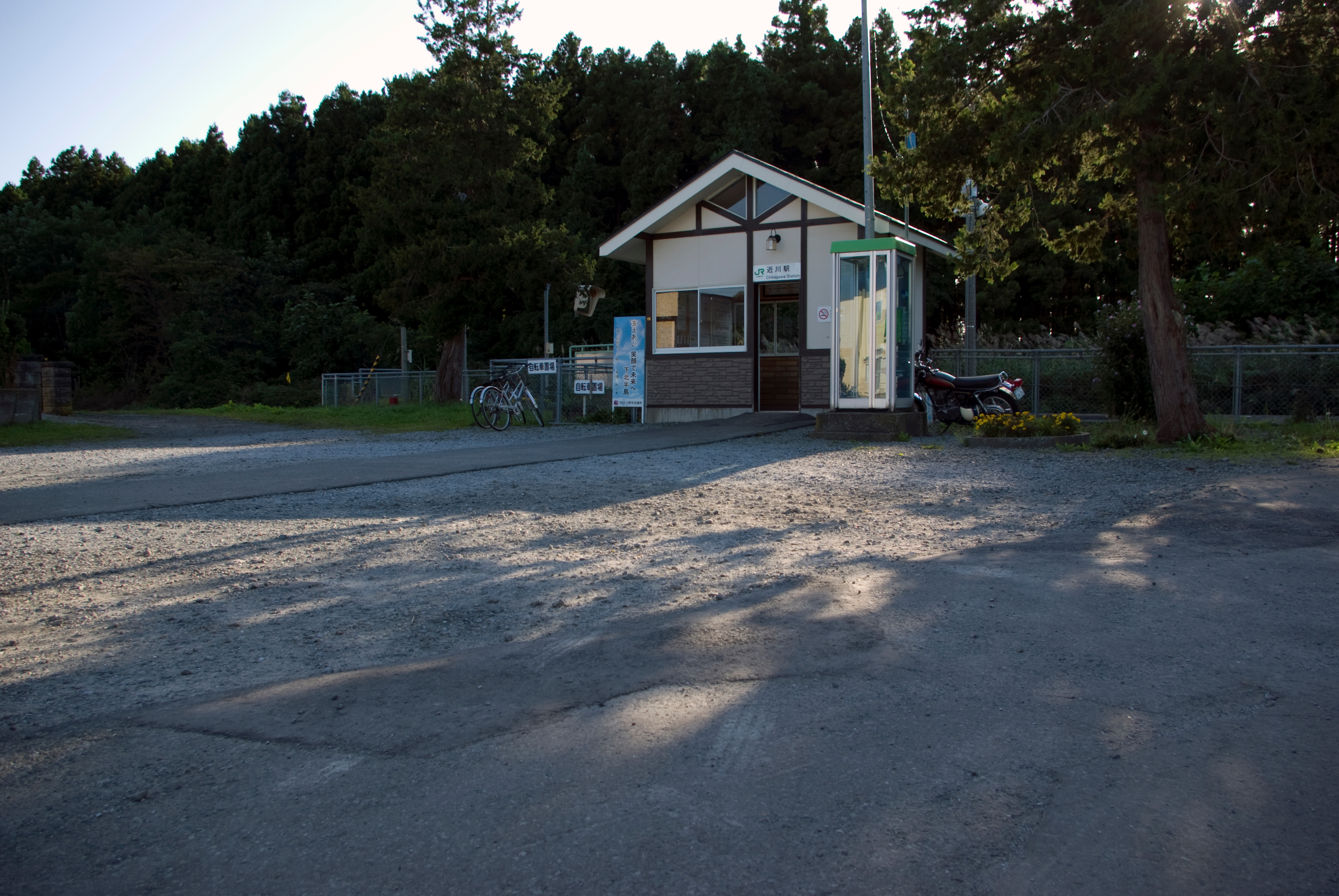 JR大湊線近川駅